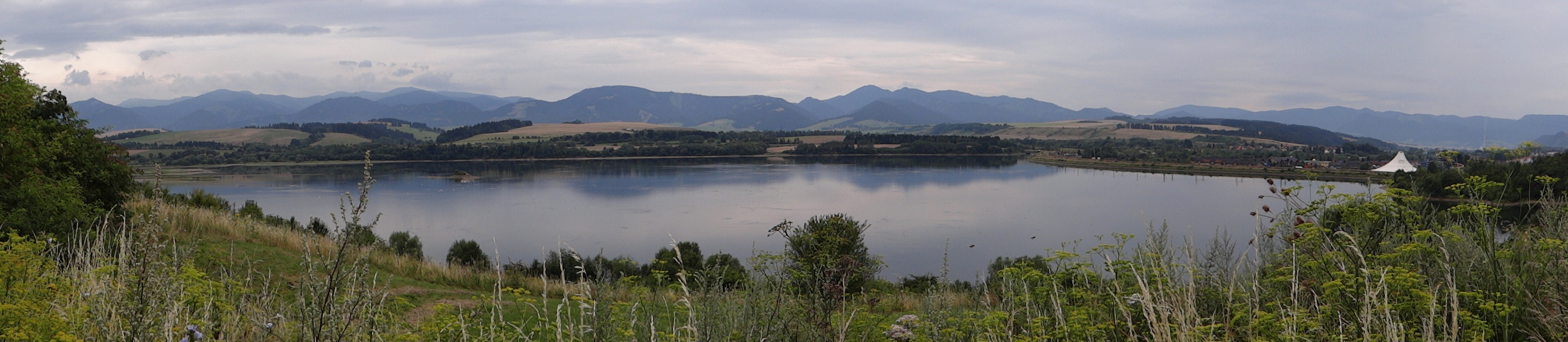 Vodní nádrž Bešeňová